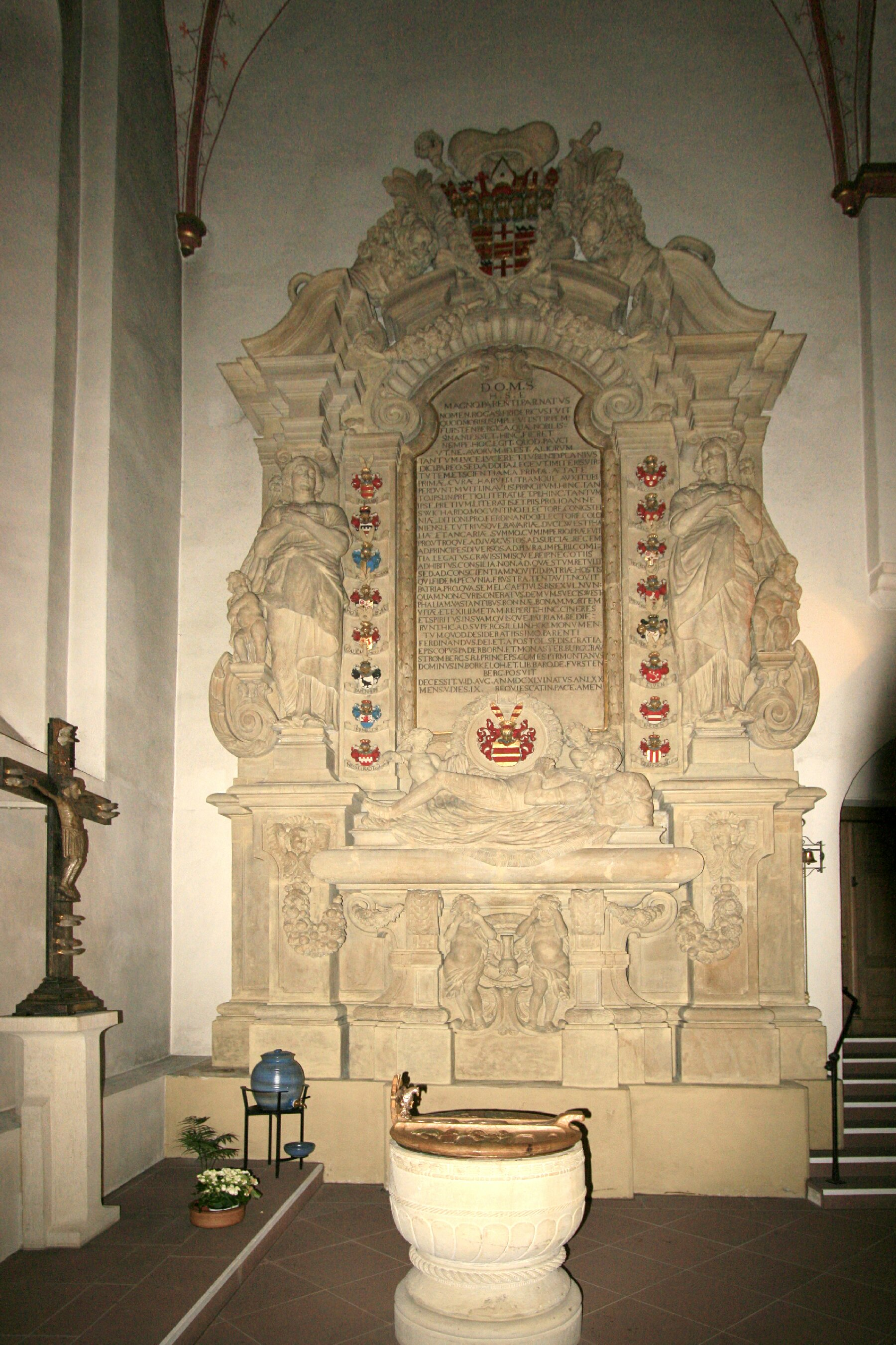 Grabmal Friedrich von Fürstenberg in der Kirche des Stifts Wedinghausen